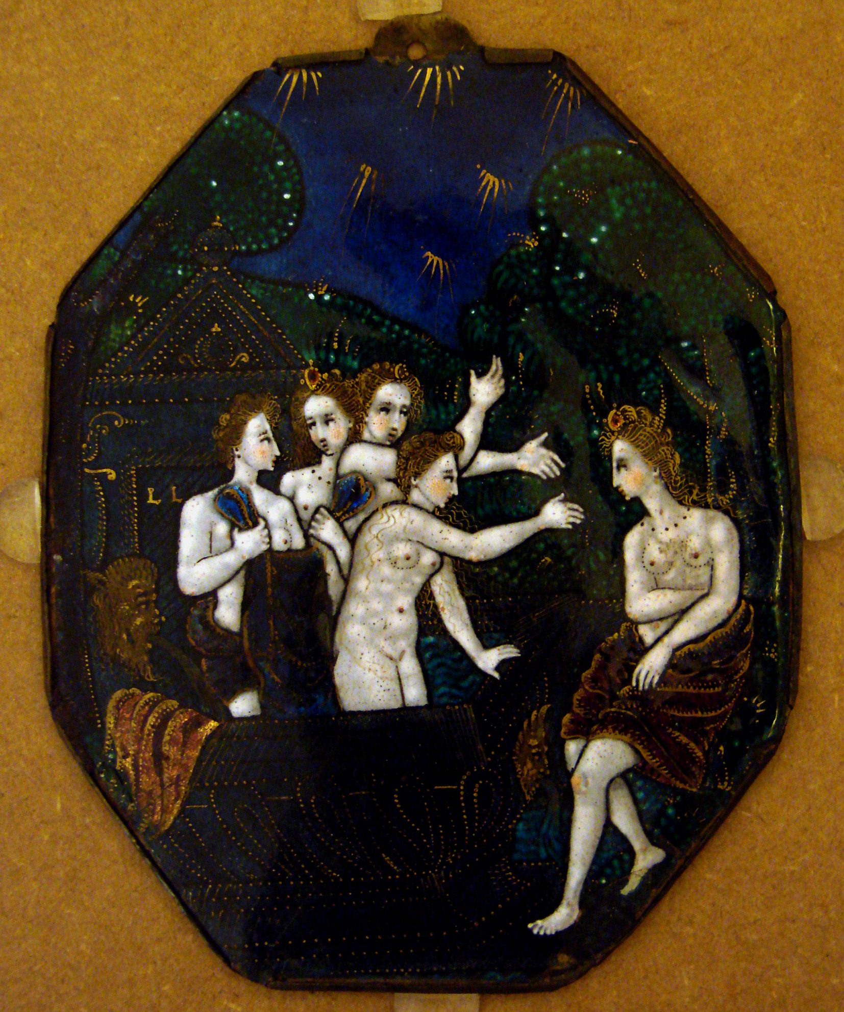 Baigneuses, émail sur cuivre par Léonard Limosin (1505-1577), Limoges. Collection du musée municipal de Châlons en Champagne.